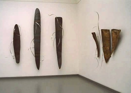 Kopasz Tamás (1958): Fém-Jelzés kiállítás (Budapest, Műcsarnok, 1999) with a cc-by-sa permission from the author ( Kopasz Tamás ) uploaded by Váradi Zsolt